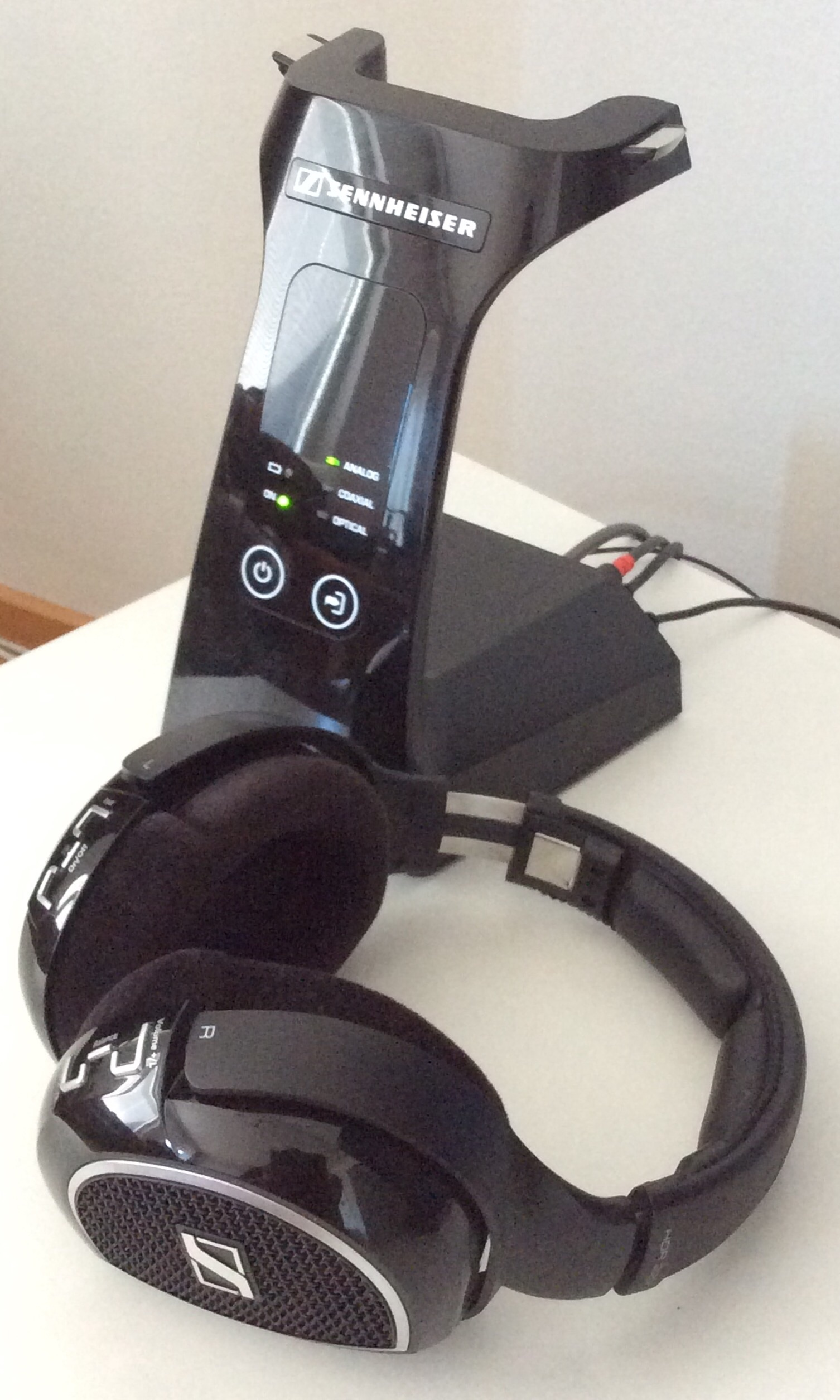 Langattomat kuulokkeet integroidulla DA-muuntimella